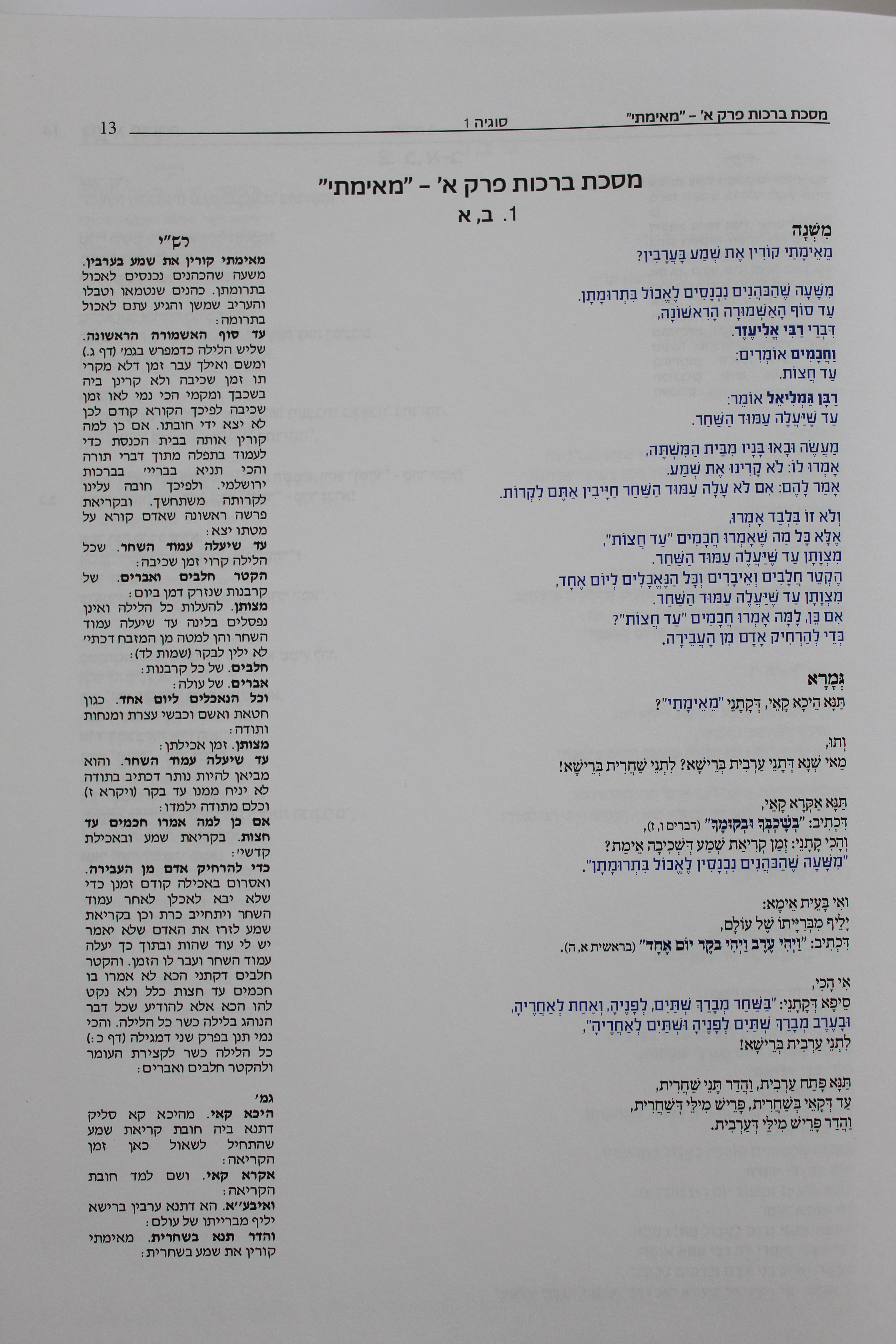 גמרא סדורה ברכות